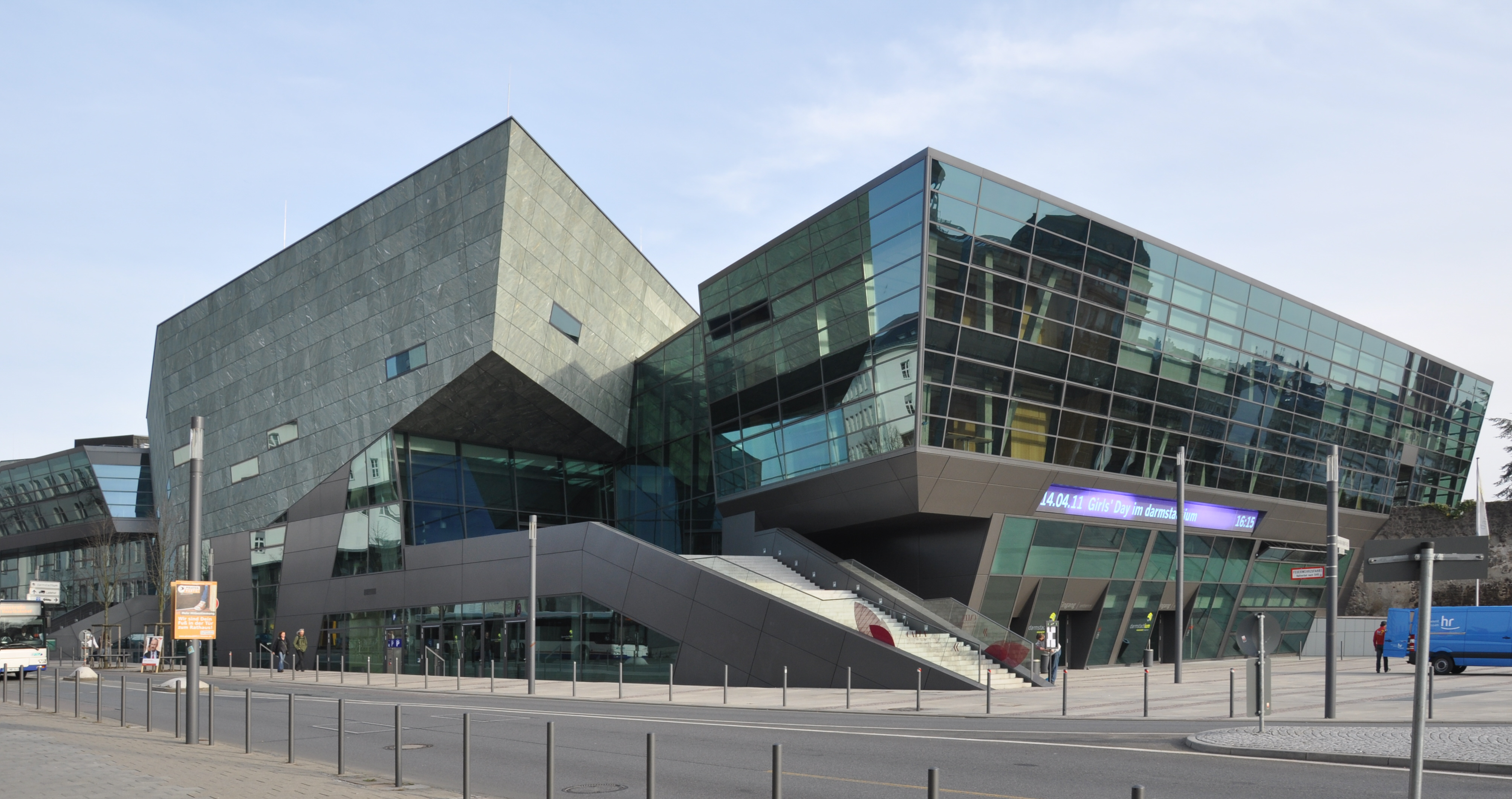 Darmstadt, Darmstadtium (science & congress center)